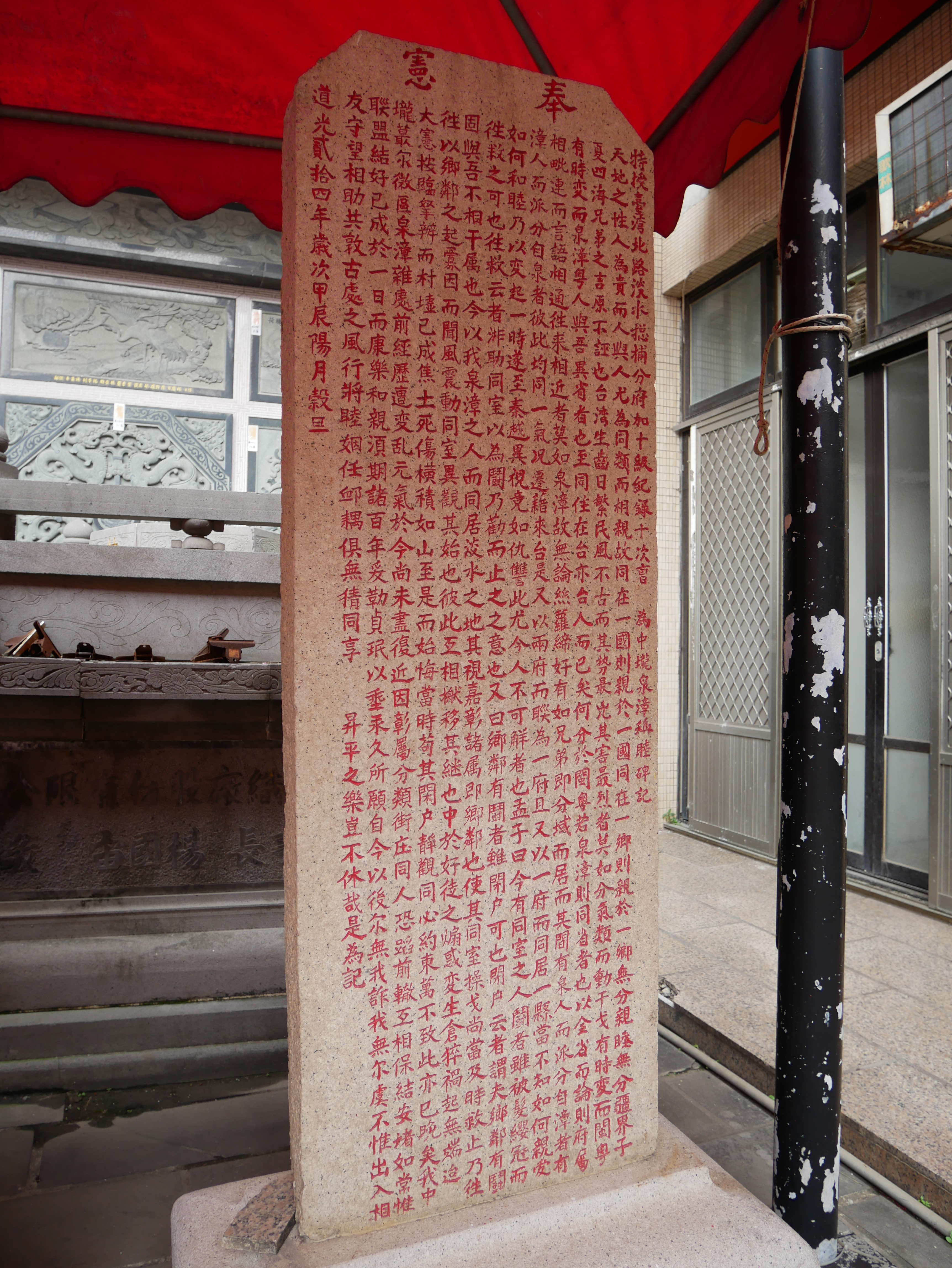 中文（台灣）: 中壠泉漳和睦碑（道光貳拾四年歲次甲辰陽月穀旦），苗栗縣竹南鎮中美里 碑文 特授臺灣北路淡水總捕分府、加十級、紀錄十次曹，為中□泉、漳和睦碑記。 天地之性人為貴，而人與人尤為同類而相親。故同在一國則親於一國，同在一鄉則親於一鄉，無分親□、無分疆界。子夏「四海兄弟」之言，原不誣也。 臺灣生齒日繁，民風不古。而其勢最兇、其害最烈者，莫如分氣類而動干戈；有時變而閩粵，有時變而泉、漳。粵人與吾異省者也，至同住在台，亦台人而已矣；何分於閩、粵？若泉、漳，則同省者也。以全省而論，則府屬相毗連而言語相通、往來相近者，莫如泉、漳。故無論絲蘿締好，有如兄弟；即分域而居，而其間有泉人而派分自漳者，有漳人而派分自泉者，彼此均同一氣。況遷籍來台，是又以兩府而聯為一府，且又以一府而同居一縣，當不知如何親愛、如何和睦；乃以變起一時，遂至秦、越異視意如仇□，此尤令人不可解者也。 孟子曰：「今有同室之人鬥者，雖被髮纓冠而往救之可也。」往救云者，非助室以為□、乃勸而此之之意也。又曰：「鄉鄰有□者，雖閉戶可也。」閉戶云者，謂夫鄉鄰有□固與吾不相干屬也。今以我泉、漳之人而同居淡水之地，其視嘉、彰諸屬，即鄉鄰也。使其同室操戈，尚當及時救止；乃往往以鄉鄰之起釁，因而聞風震動，同室異觀。其始也，彼此互相搬移；甚繼也，中於奸徒之煽惑。變生倉猝，禍起無端。迨大憲按臨拏辦，而村墟已成焦土，死傷橫積如山。至是，而始悔當時茍其閉戶靜觀、同心約束，萬不致此，亦已晚矣。 我中□蕞爾微區，泉、漳雜處。前經歷遭變亂，元氣於念尚未盡復。近因彰屬分類，街庄同人恐蹈前轍，互相保結，安堵如常。惟聯盟結好已成於一日，而康樂和親須期諸百年；爰勒貞□，以垂永久。所願自今以後，爾無我詐、我無爾虞。不惟出入相友、守望相助，共敦古處之風；行將睦姻任恤、耦俱無猜，同享昇平之樂，豈不休哉！是為記 道光貳拾四年歲次甲辰陽月縠旦